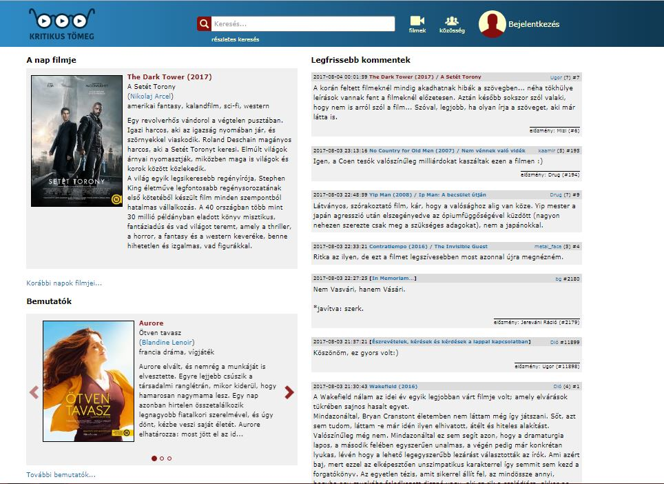 A Kritikus Tömeg oldalának kinézete